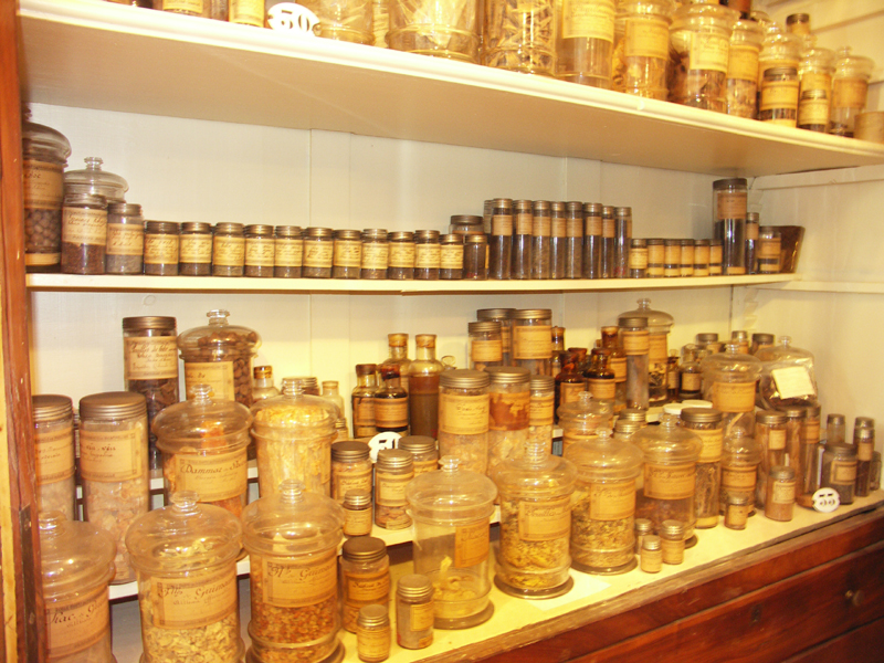 Le droguier de Montpellier Photographie personnelle prise en septembre 2004